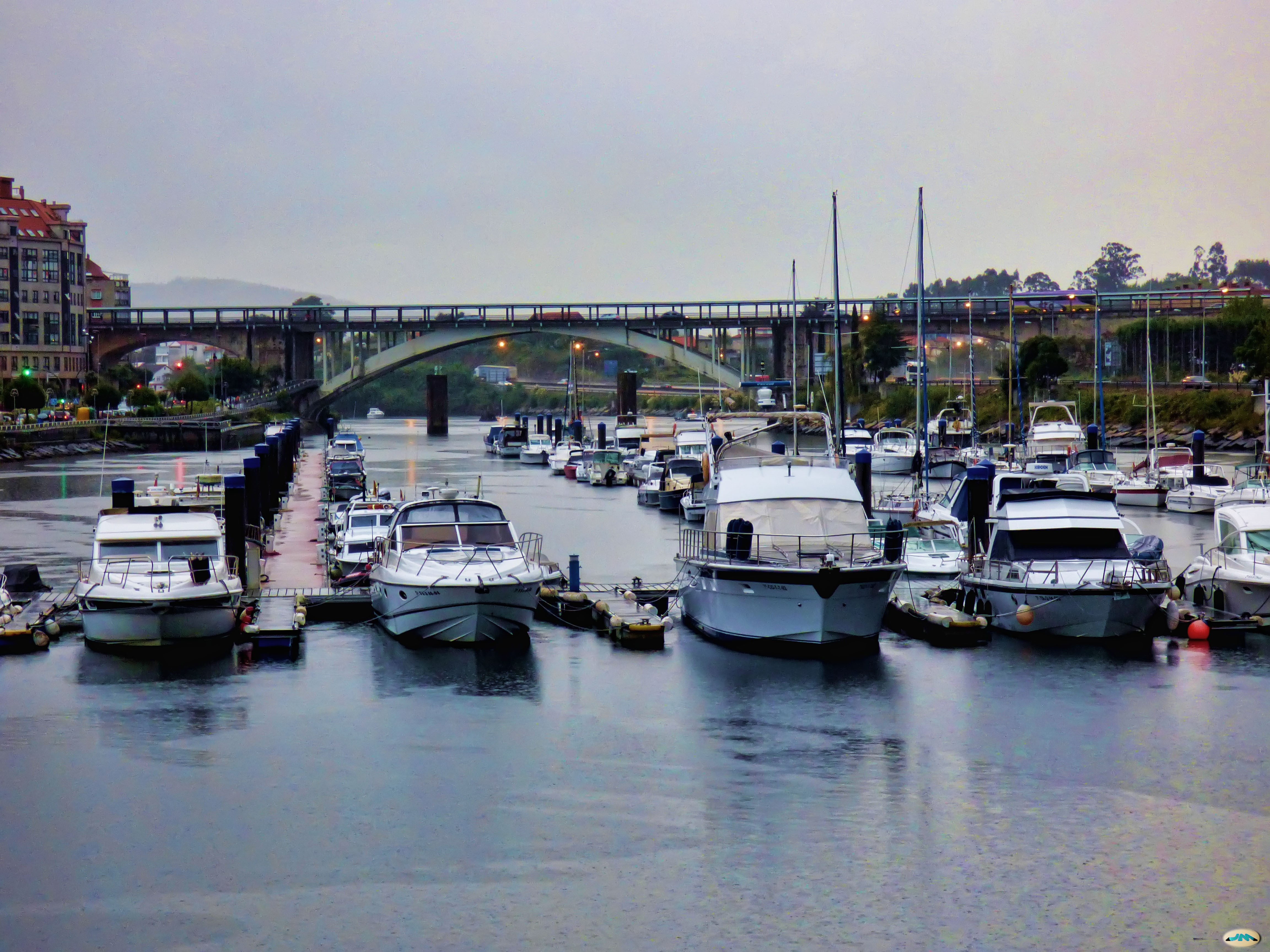 Pontevedra-Lluvias del final del verano